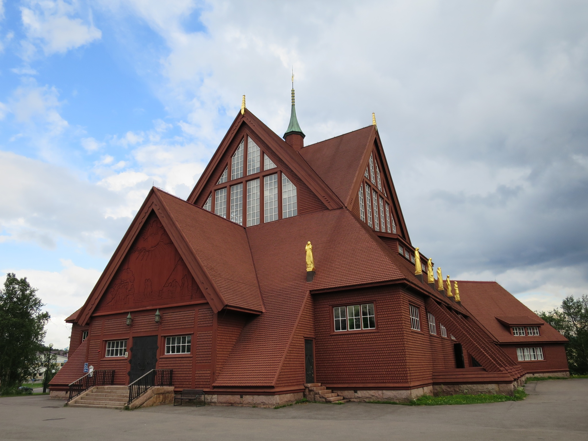 Kiruna kyrka, Summer 2014